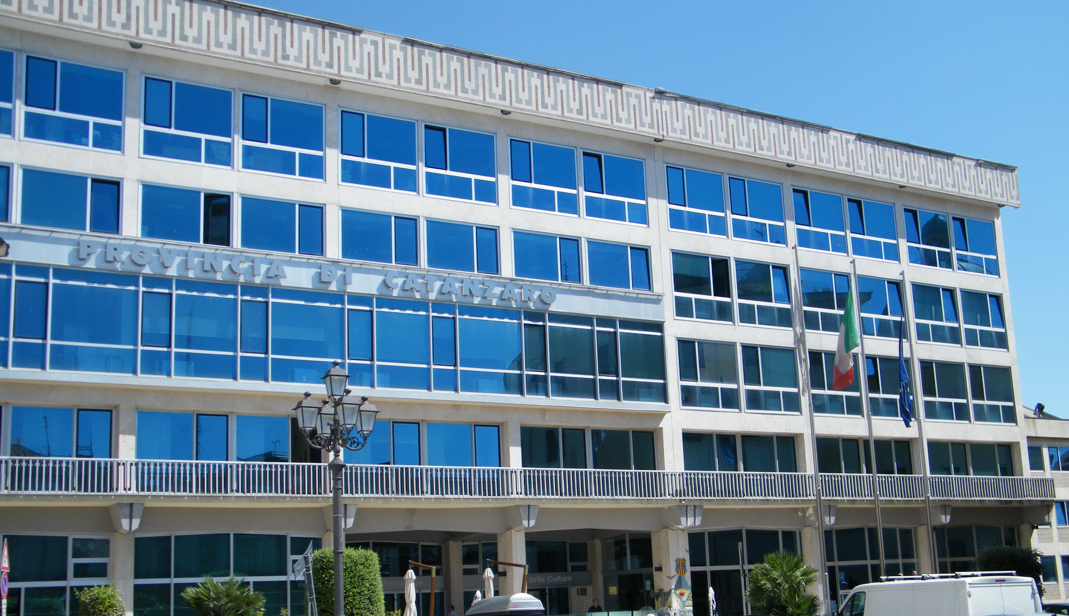 Palazza di vetro, sede dell'amministrazione provinciale catanzarese.